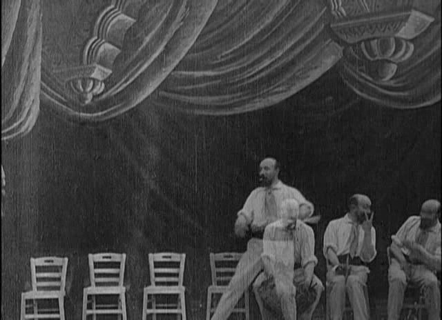 Méliès, L'homme-orchestre (Star Film 262-263, 1900) 01